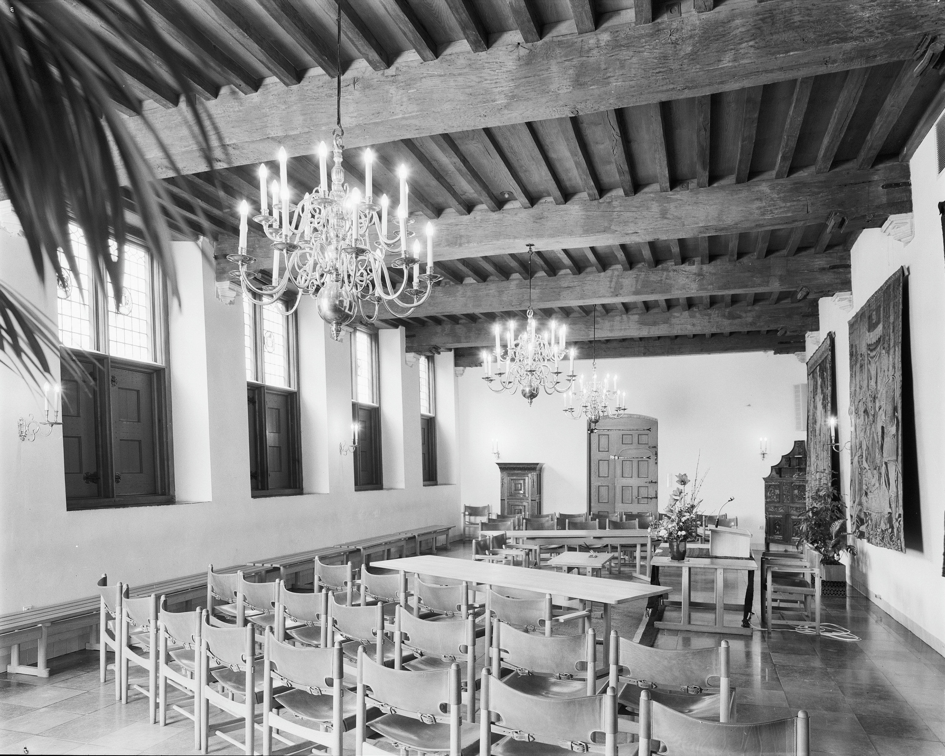 Statenhof: Interieur Statenzaal op de begane grond